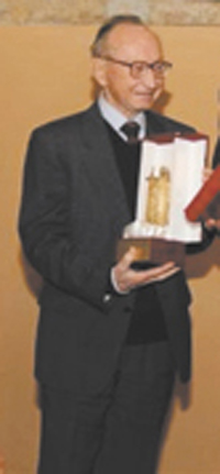 Antonio Glauco Casanova mentre ritira il Premio Federichino 2008. Foto realizzata da me.